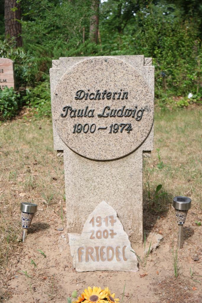 Grab der österreichischen Schriftstellerin und Malerin Paula Ludwig (1900-1974) auf dem Waldfriedhof in Darmstadt.